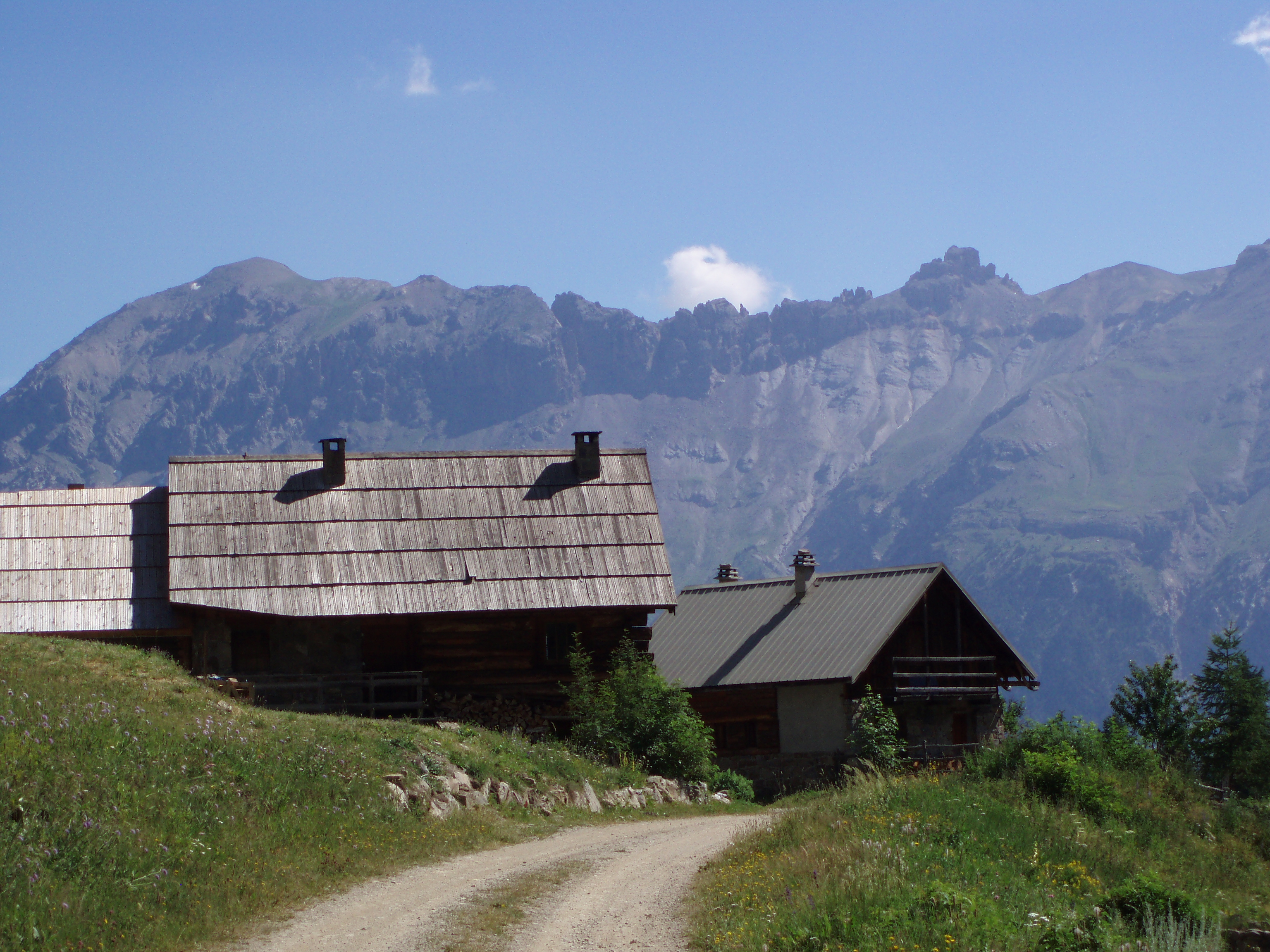 Hameaux de Narreyroux, situé au dessus de Puy-Saint-Vincent dans les Alpes Françaises.